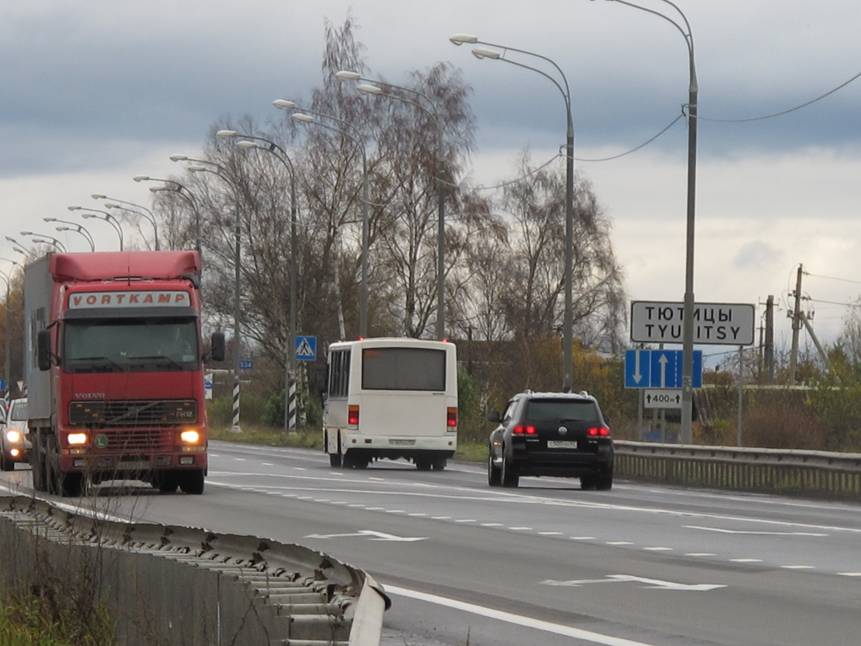 Трасса M10 у деревни Тютицы Новгородской области